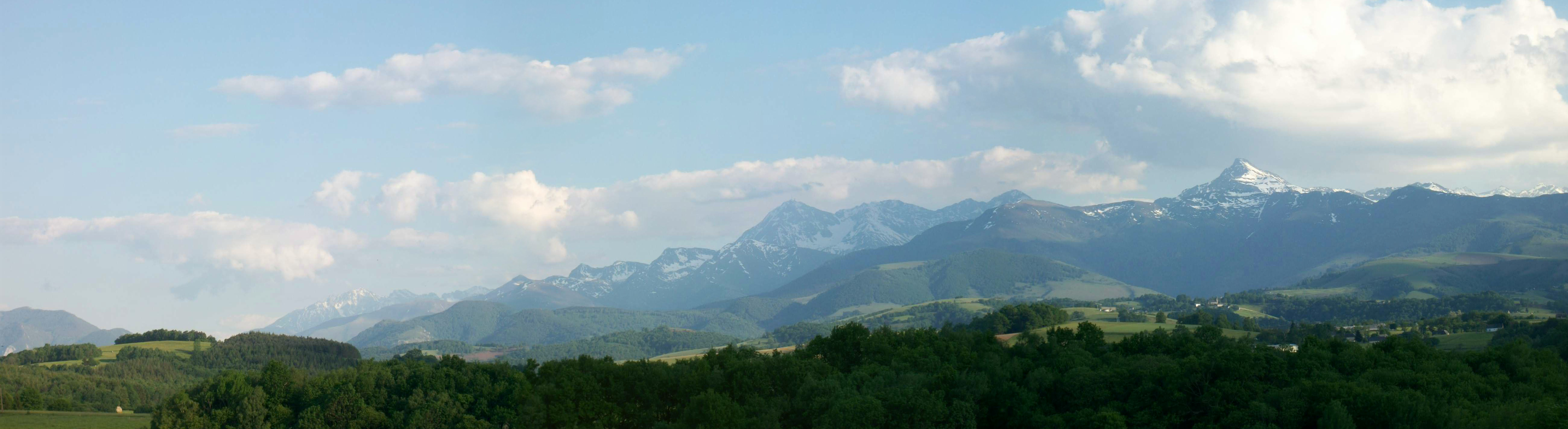 vue sur la chaîne des Pyrénées (Visker, 65) : Pic du Midi de Bigorre (gauche) et Pic du Montaigu (droite)